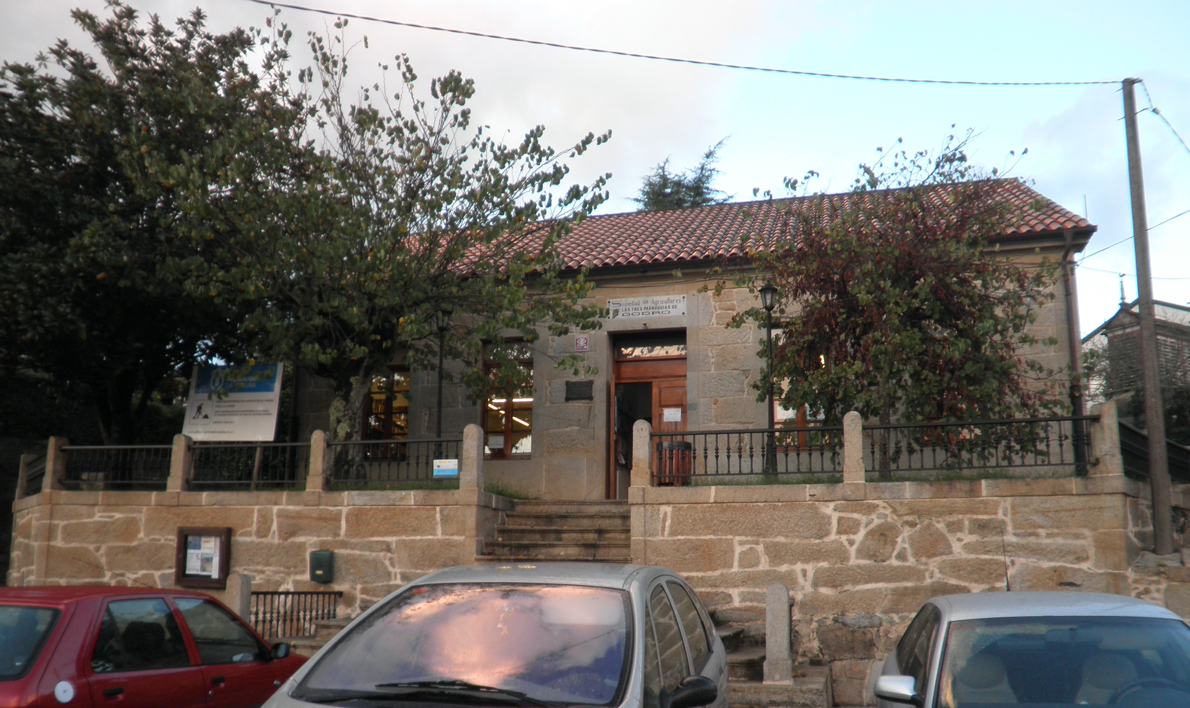 Casa da Cultura, biblioteca municipal de Dodro.